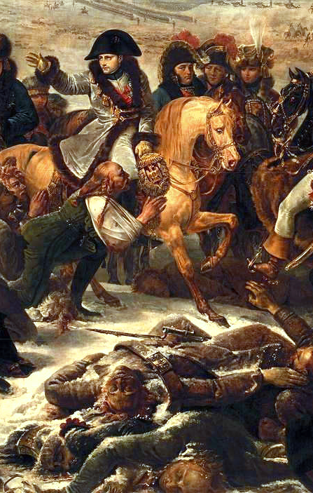 detail